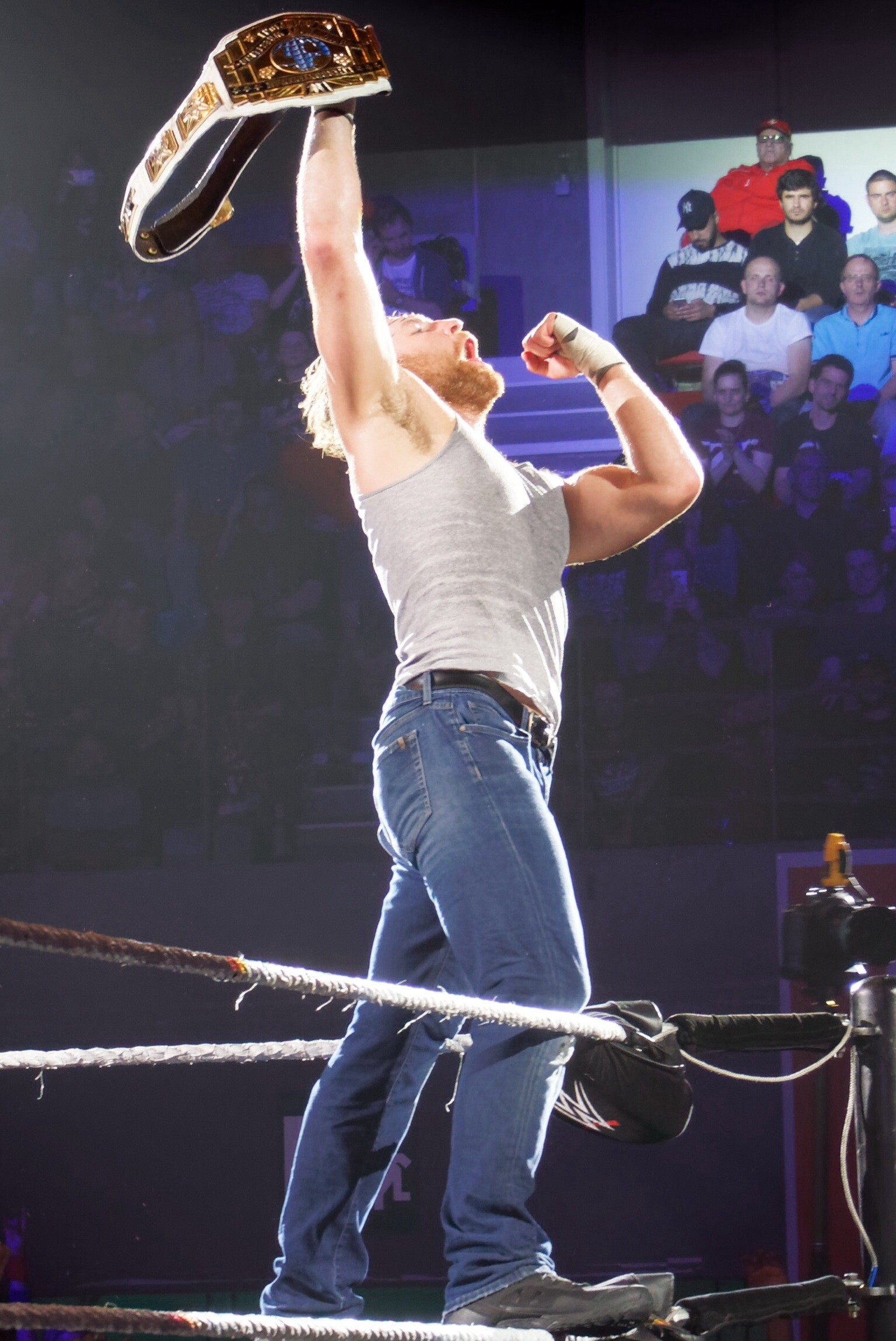 Dean Ambrose (c) defeats The Miz (With Maryse) Info on the match : WWE Intercontinental Title Match ( Le vendredi 12 mai, la WWE Live Tour fera escale au Country Hall a Liege pour le spectacle de catch de l'annee! Au programme: des duels impitoyables et des rencontres captivantes entre les meilleures equipes et les plus grands rivaux. )